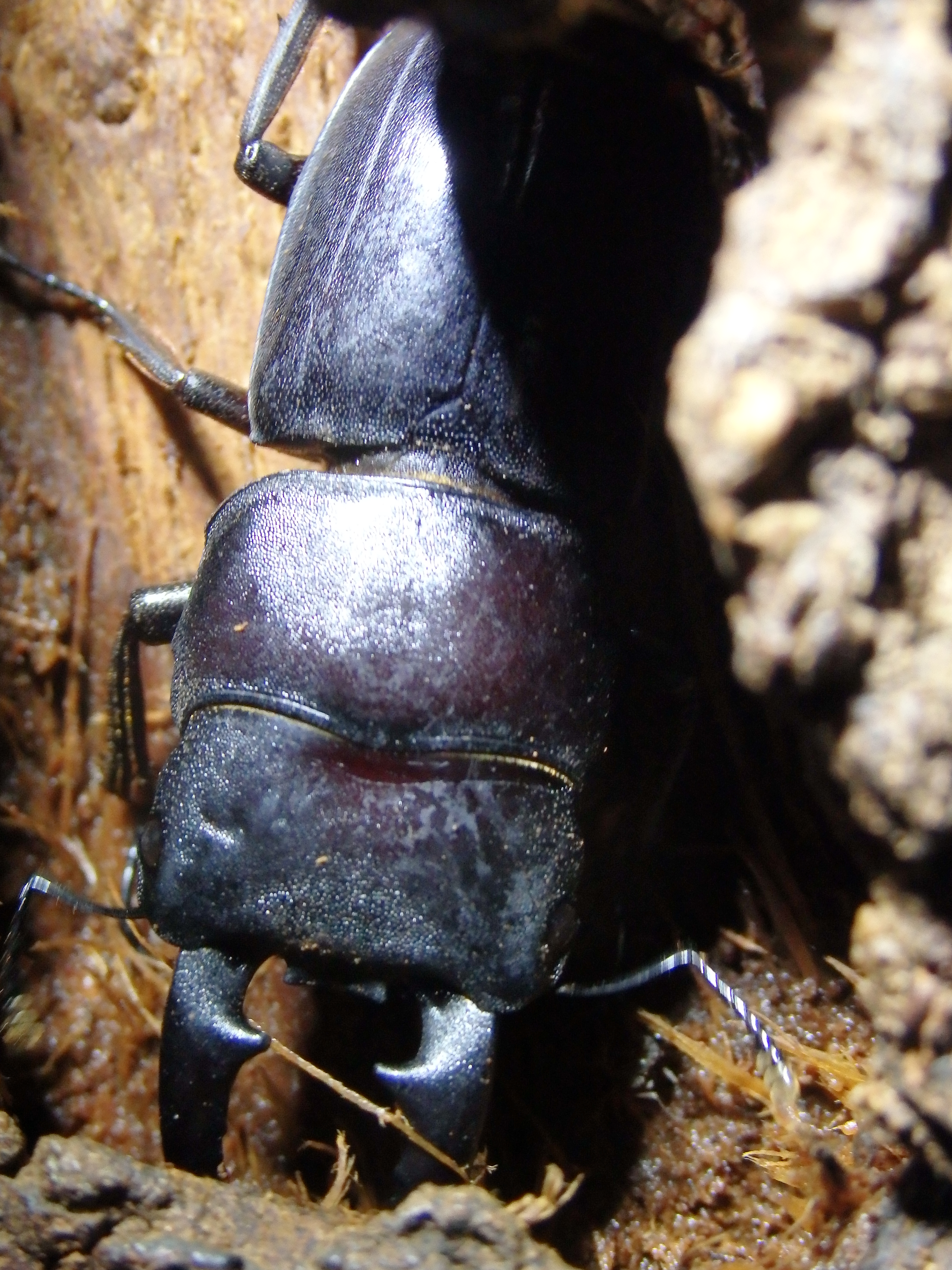 体色に赤みを帯びた個体